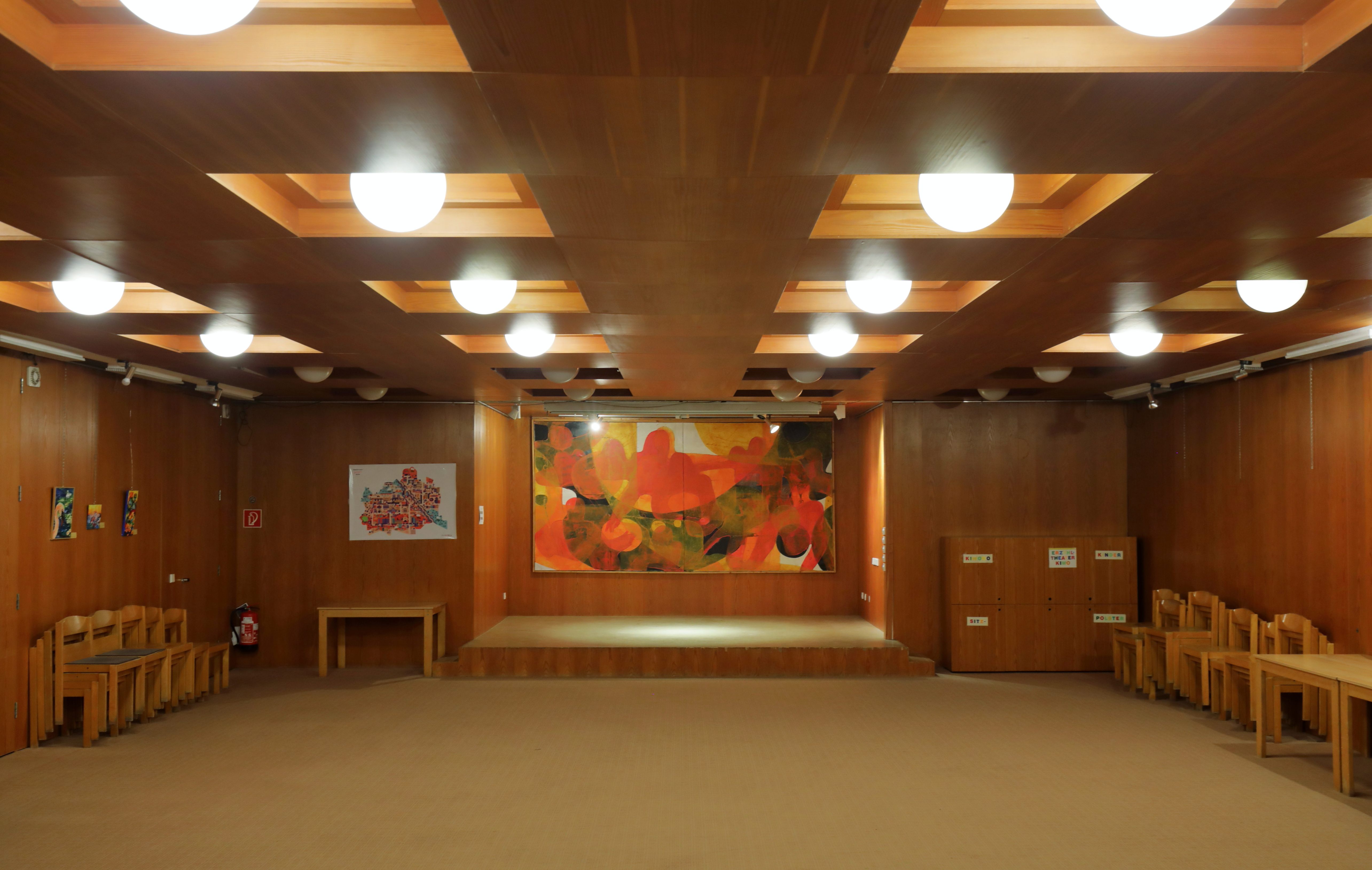 Die Unterkirche bzw. der Gemeindesaal der Wotruba- bzw. Dreifaltigkeitskirche auf dem Georgenberg im Wiener Stadtteil Mauer des 23. Gemeindebezirkes Liesing.Die Unterkirche (Gemeindesaal) befindet sich im Kellergeschoss der Wotrubakirche und ist nach der Achse der Hauptkirche ausgerichtet. Sie ist fast 350 Quadratmeter groß, hat ostseitig eine eingezogene, rechteckige Apsis und ist vollständig mit Holz ausgekleidet..Die Wotrubakirche im Stil des Brutalismus wurde auf Initiative von Margarethe Ottillinger (1919–1992) und nach einer Idee des Künstlers Fritz Wotruba (1907–1975) vom Architekten Fritz Gerhard Mayr (* 1931) errichtet. Der Entwurf für die Kirche (152 Betonblöcke mit einen Gesamtgewicht von über 4000 Tonnen, ohne Symmetrie aufeinander geschachtelt, mit schmalen, verschieden hohen Fensteröffnungen) wurde von Wotruba 1964 präsentiert. Wegen großem Widerstand konnte man erst 1974 mit dem Bau beginnen und zwei Jahre später, am 24. Oktober 1976, erfolgte die feierliche Einweihung durch Kardinal Franz König.